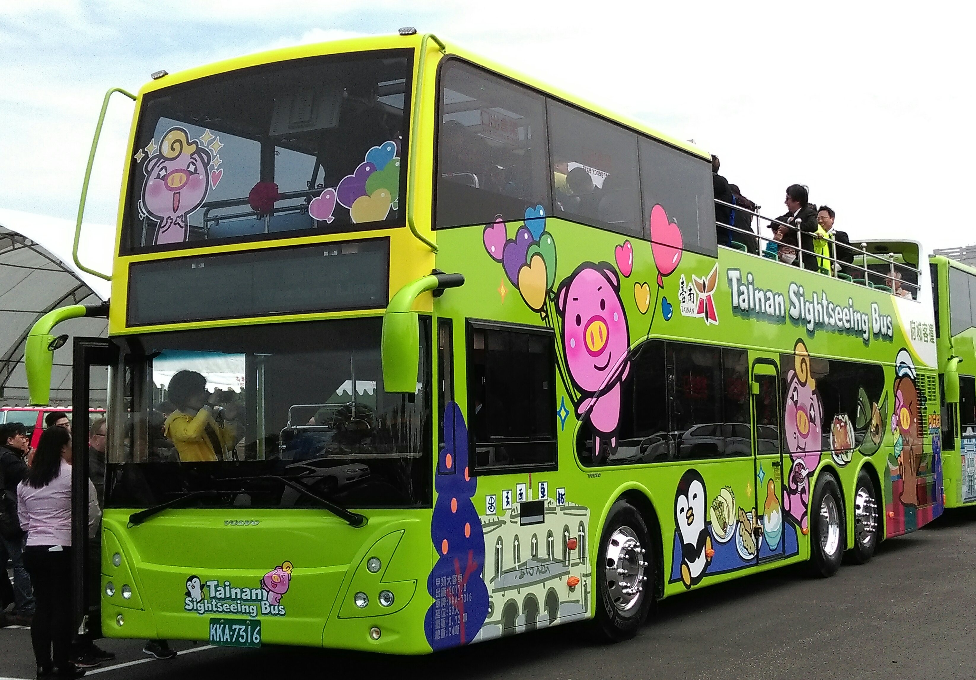 中文（台灣）: 府城客運雙層巴士KKA-7316。